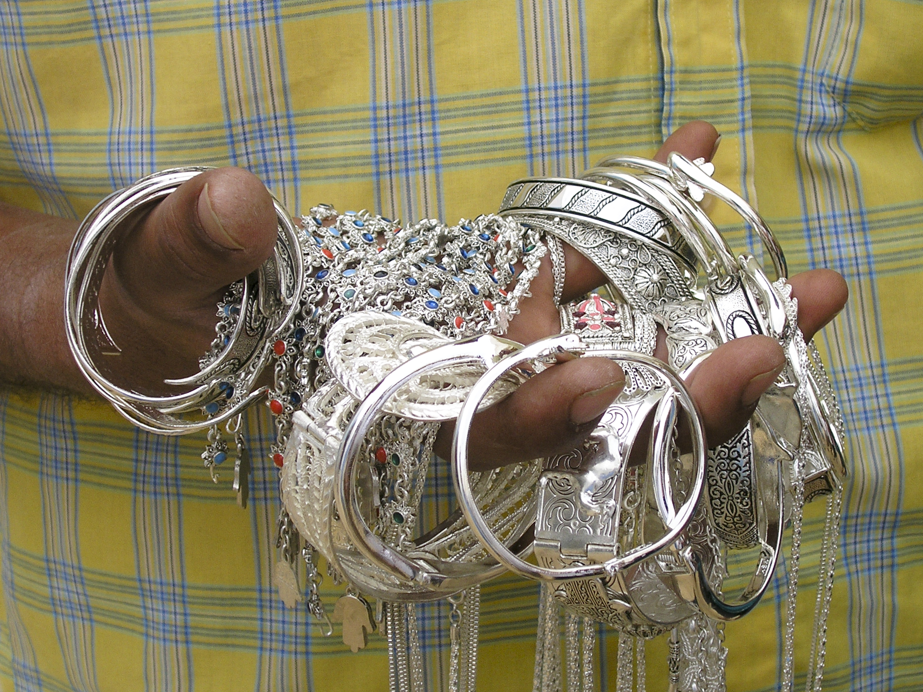 Djerba. Tunisia